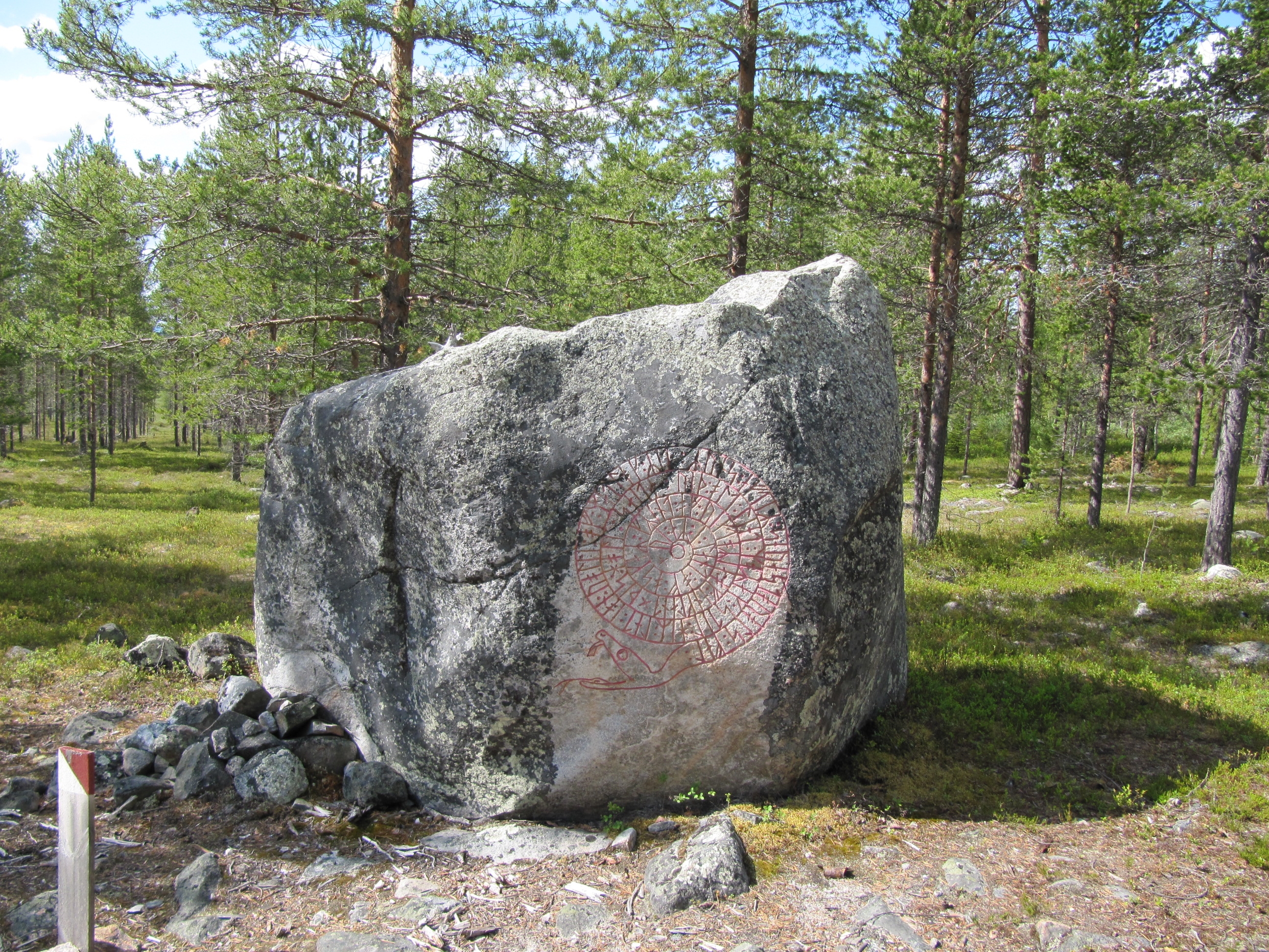 Englantilainen lintutieteilijä John Wolley vietti Ylimuoniossa 4 vuotta 1853-57 keräten suuren munakokoelman. Jostain syystä hän kaiversi Muonionvaarassa olevaan seitakiveen riimukirjoituksen ruotsin ja englannin sotkulla.